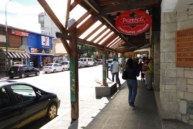 Сан-Карлос-де-Барилоче. На главной улице.